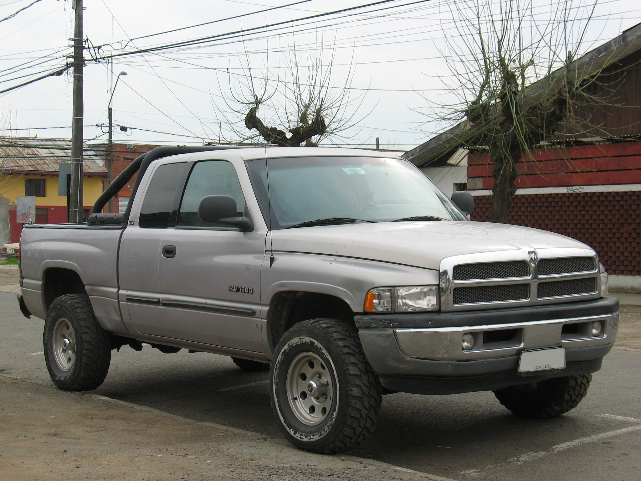 Dodge Ram 1500 SLT Laramie Quad Cab 2000